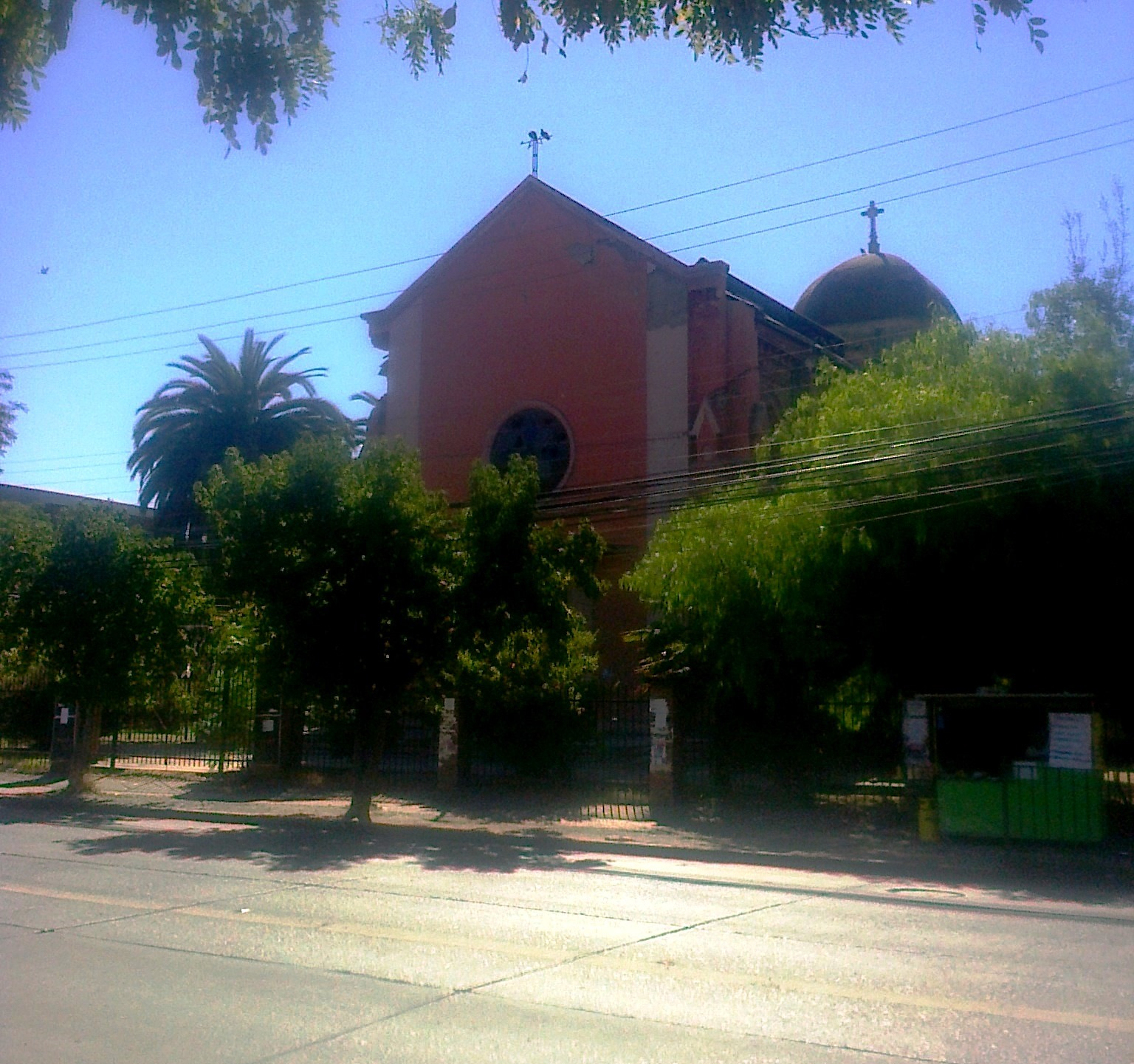 Iglesia de la Comunidad Apóstol Pedro o del Buen Pastor de Talca. Ubicada en Av. Carlos Schorr Nº 83 de esa ciudad This is a photo of a national monument in Chile: 387